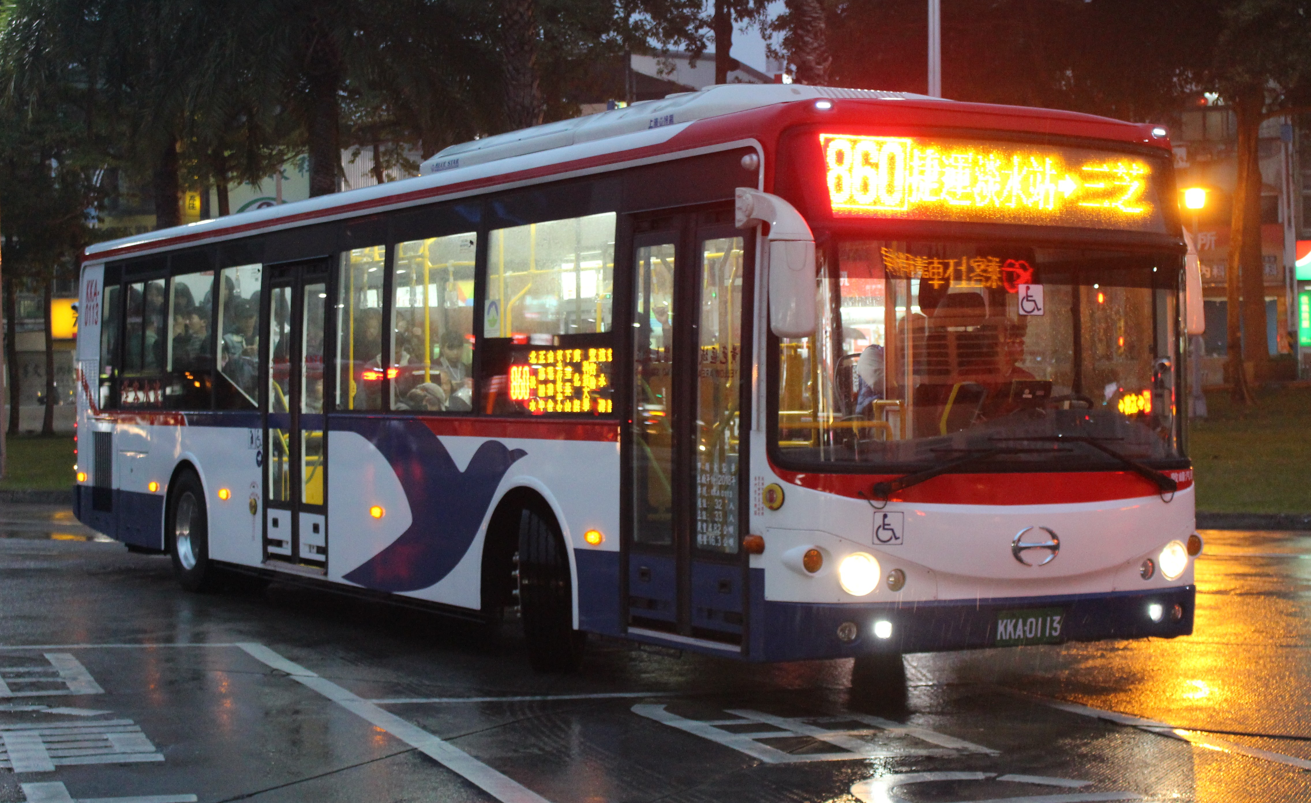 淡水客運 敦峰汽車HINO HS8JRVL-UTF KKA-0113 860門側